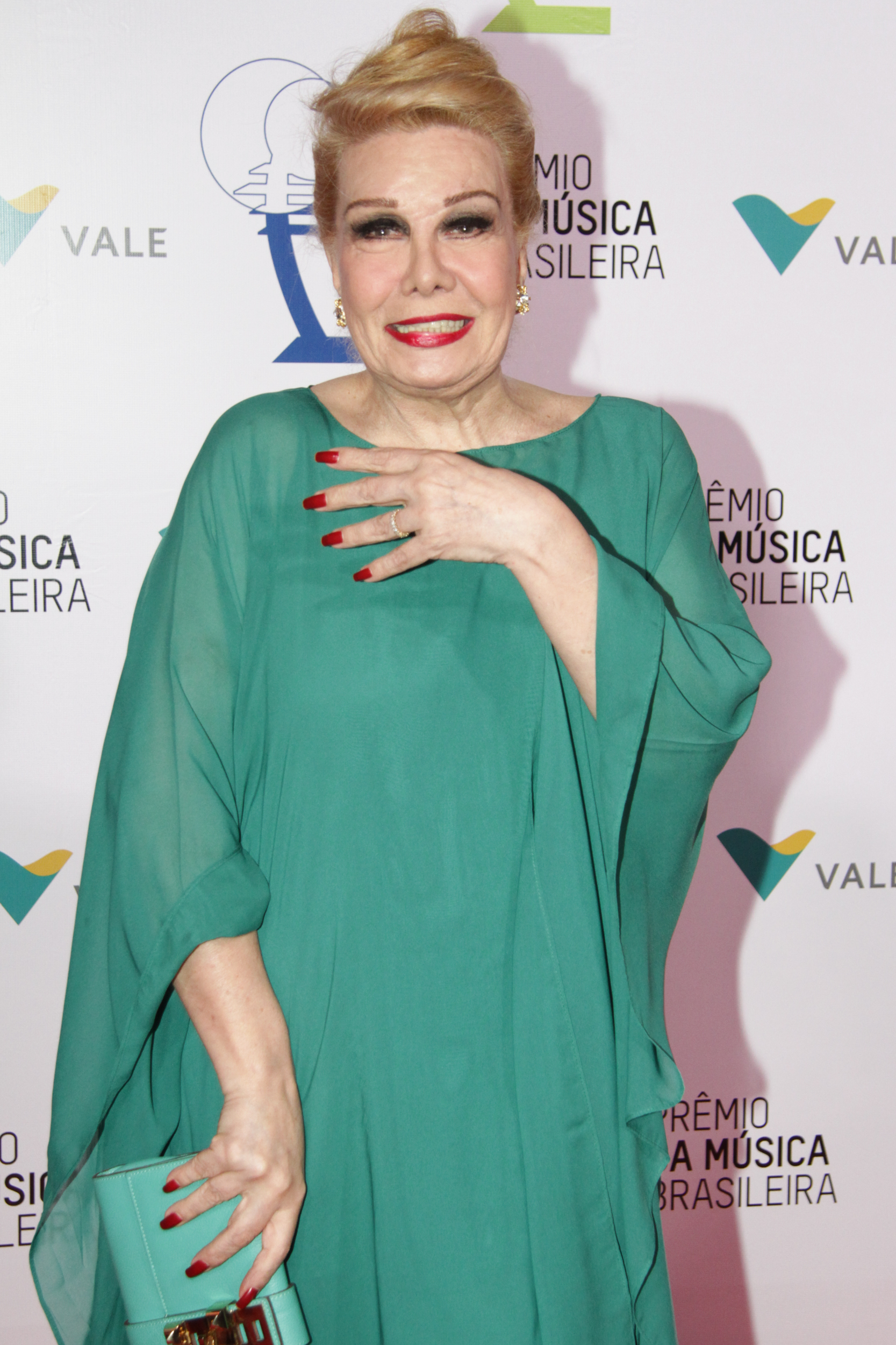 Rogéria - 26° Prêmio da Música Brasileira 2015, no Theatro Municipal, no Centro do Rio de Janeiro/RJ. (10/06/15) Foto: Roberto Valverde/Divulgacão